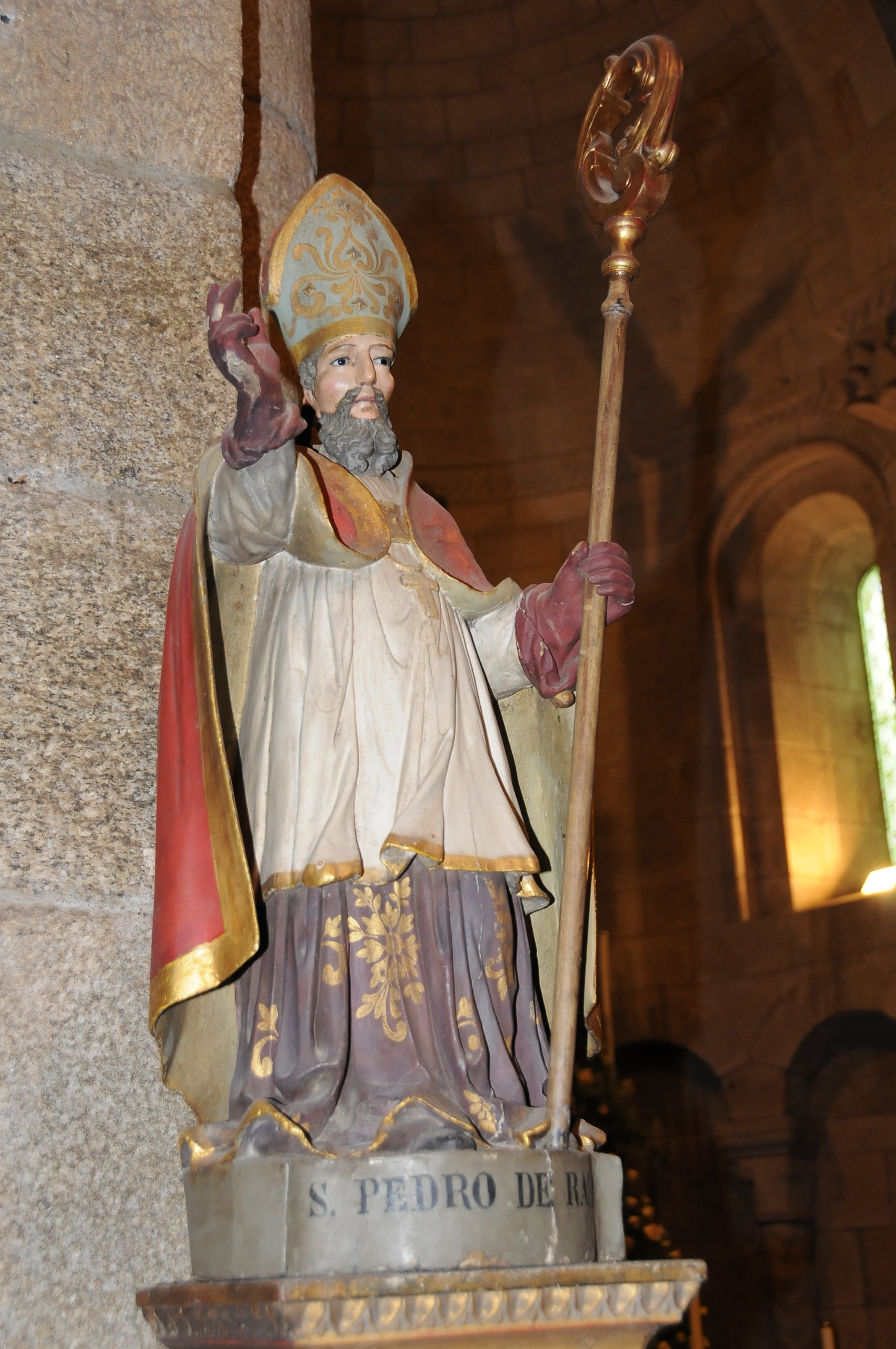 Statue of Pedro de Rates in Church São Pedro de Rates in Rates Povoa de Varzim, Portugal